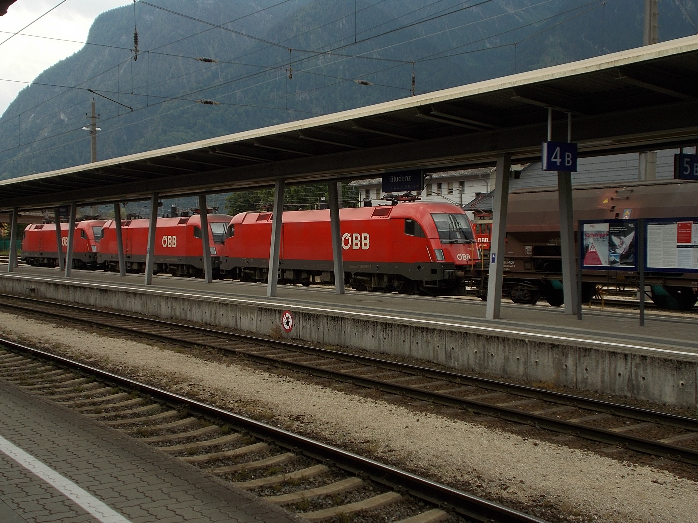 Ein mit drei "Taurus" bespannter Güterzug steht 2018 im Bahnhof Bludenz zur Abfahrt in Richtung Arlberg bereit.